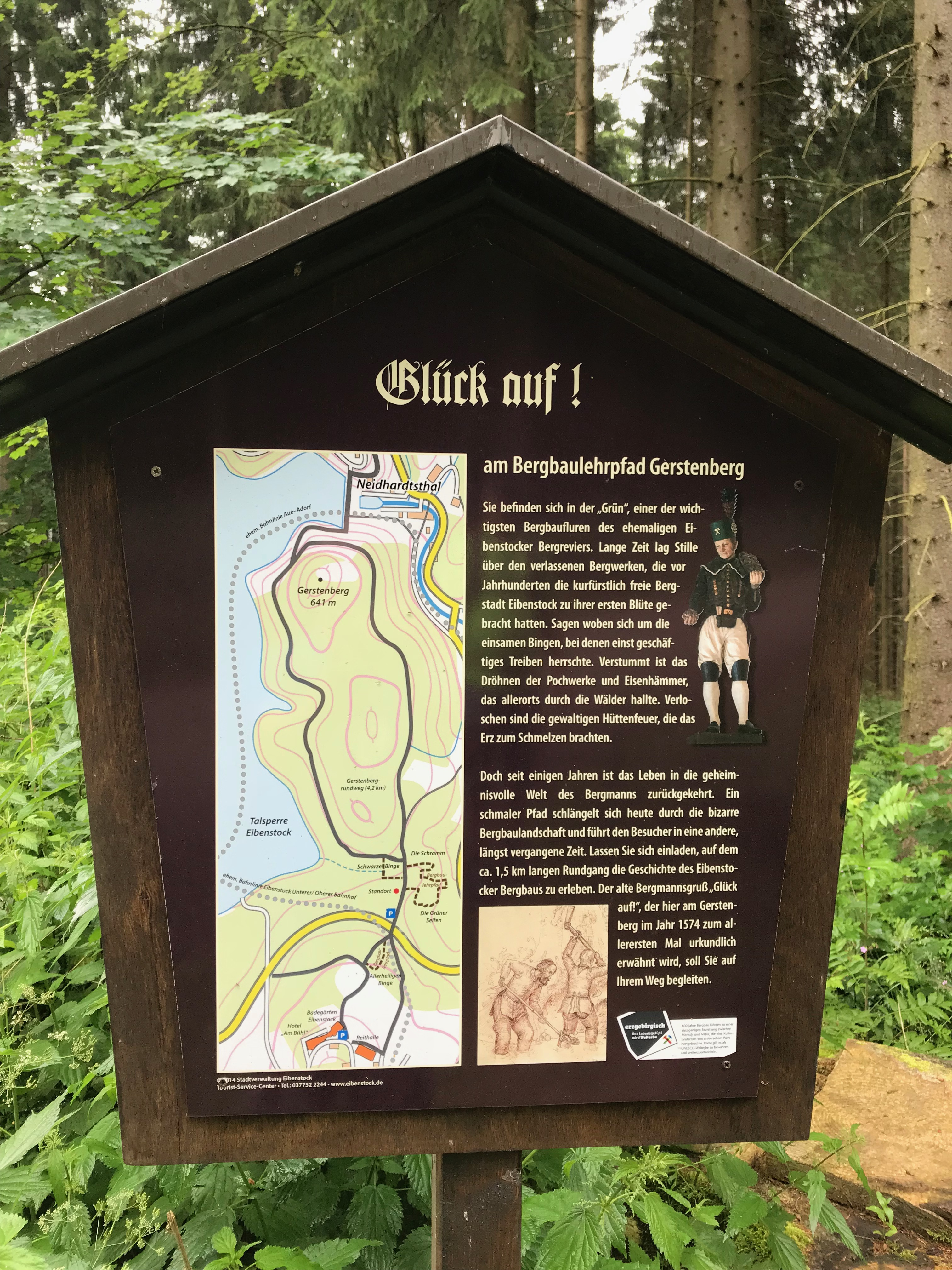 Grüner Seifen